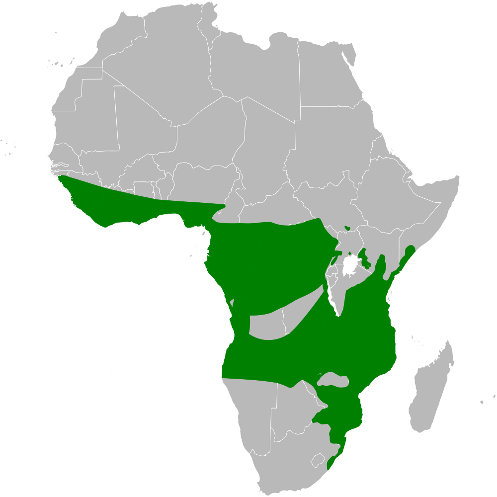 Chlorocichla distribution map